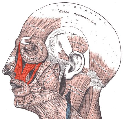 Levator labii superioris muscle